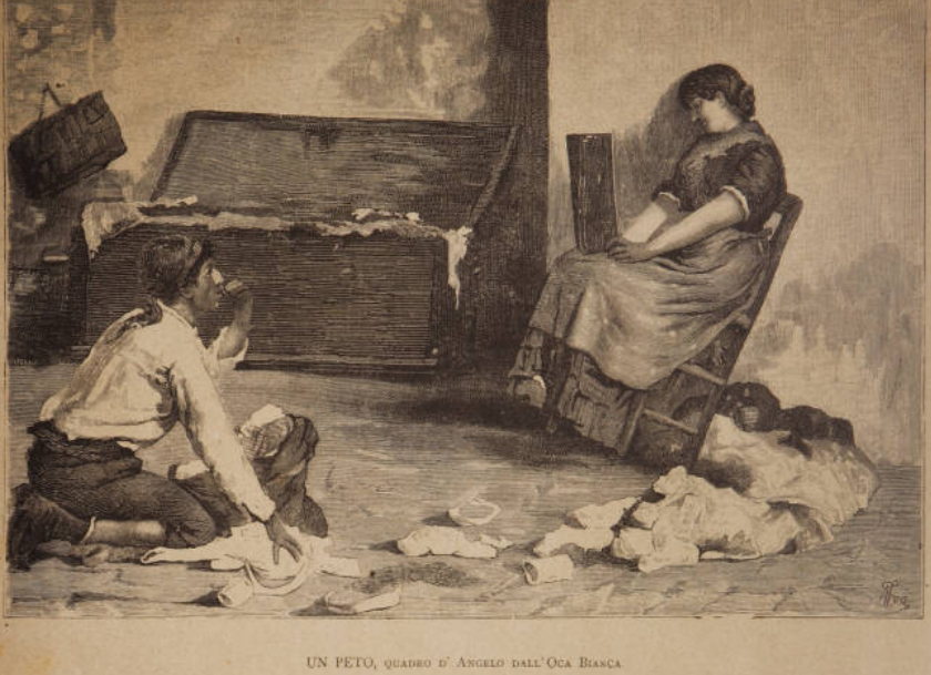 Un peto